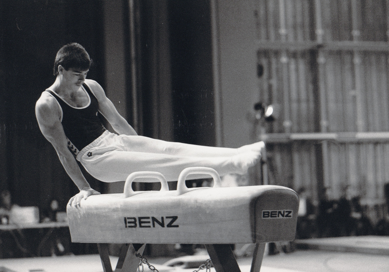 Kunstturner Reinhard Blum am Pauschenpferd beim Medico-Cup im Festspielhaus Bregenz in den 1980er Jahren.